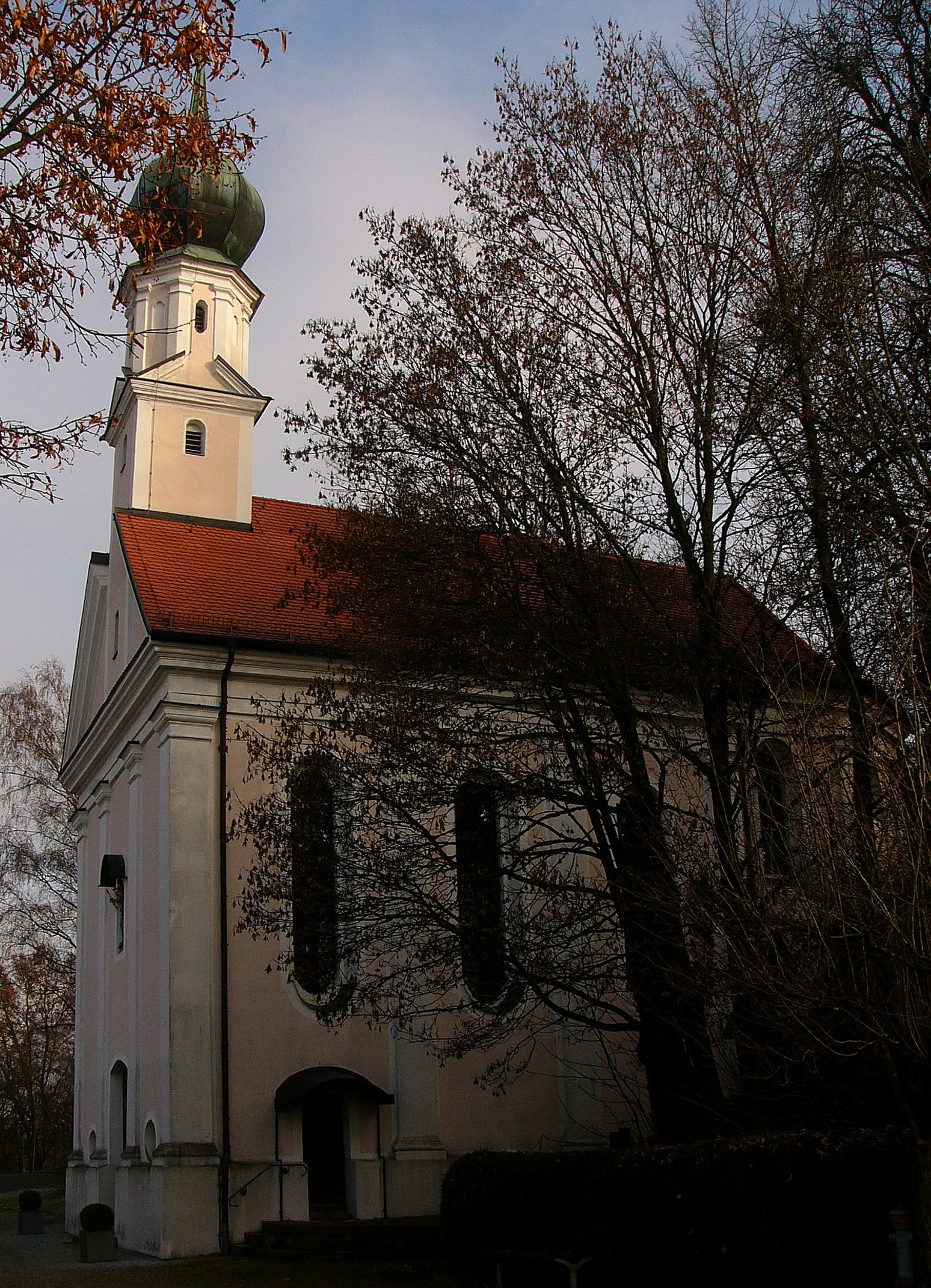 Katholische Wallfahrtskirche Mariä Heimsuchung; sog. Steinfelskirche, barocker Saalbau mit Dachreiter, Chor um Sandsteinfelsen herumgebaut, Ende 17. /Anfang 18. Jahrhundert, Weihe 1716; mit Ausstattung. This is a photograph of an architectural monument.